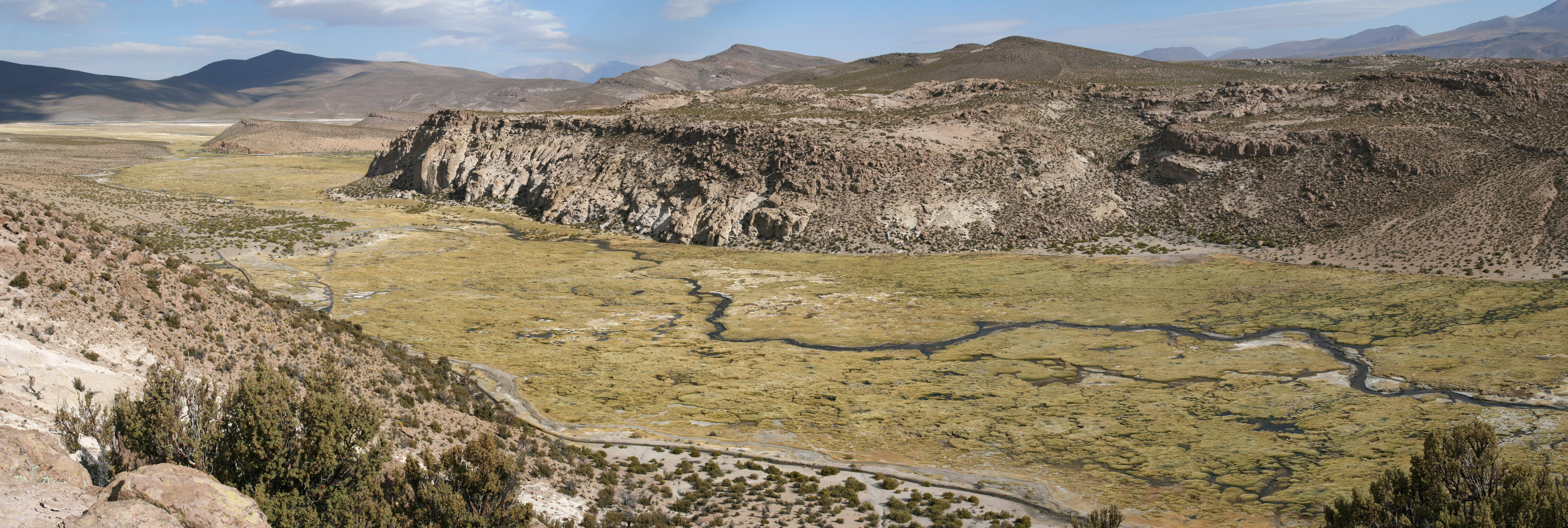 A valley in Parque Nacional Volcán Isluga, Región de Tarapacá, Chile